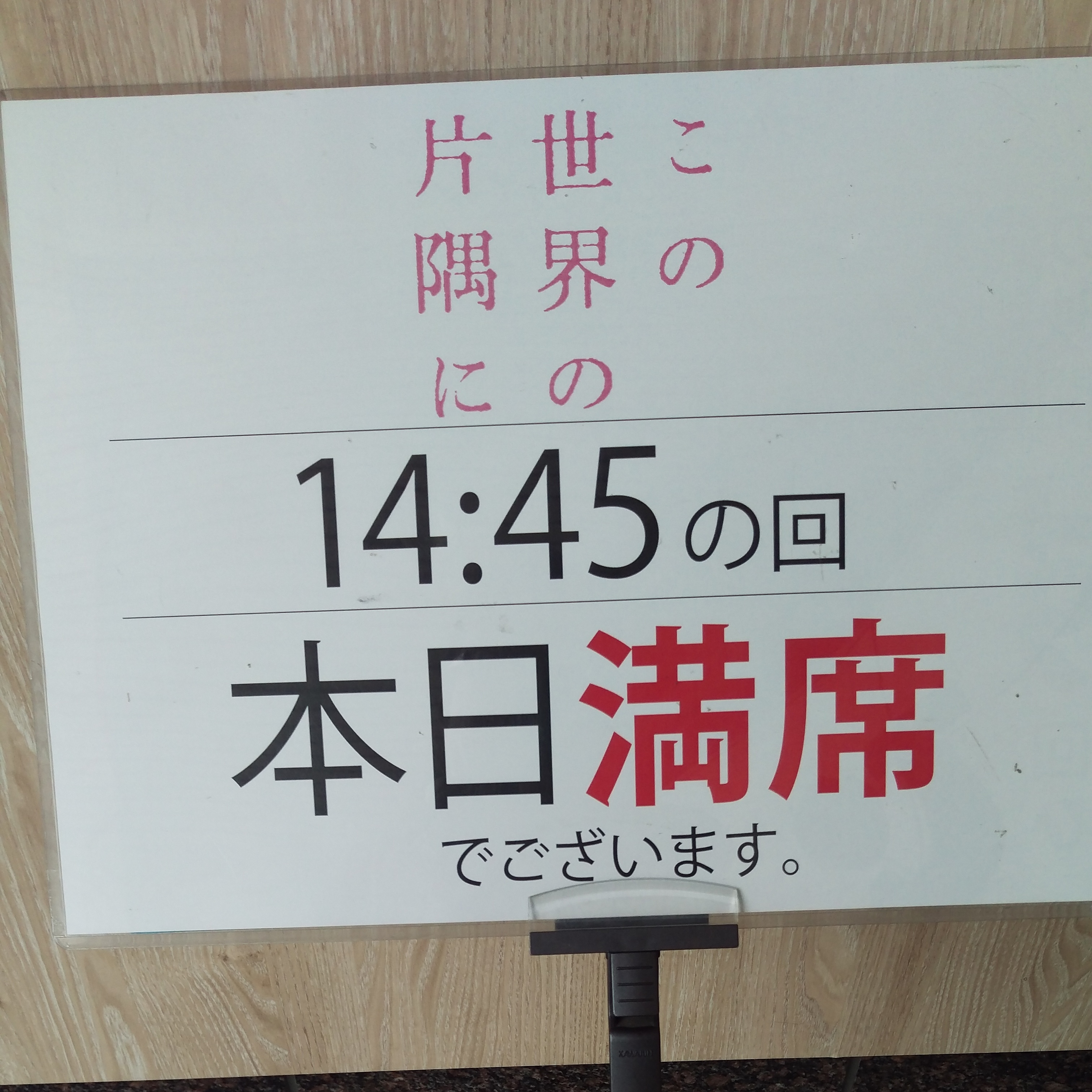 残念。こりゃあ劇場で見るのは無理そうだな。シネコンで見る気はないし。